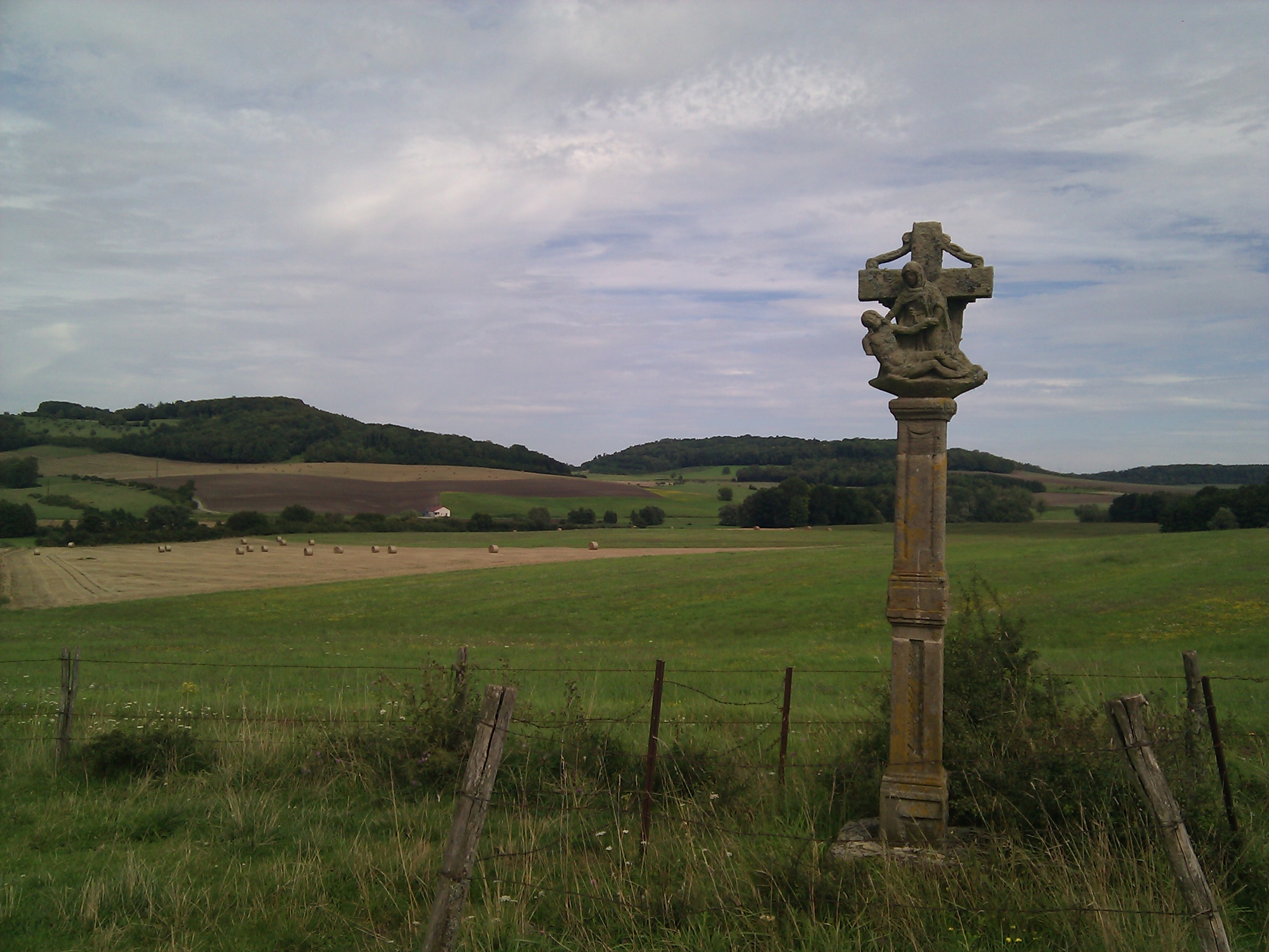 Croix de chemin sculptée à Rugney (Vosges) - époque moderne